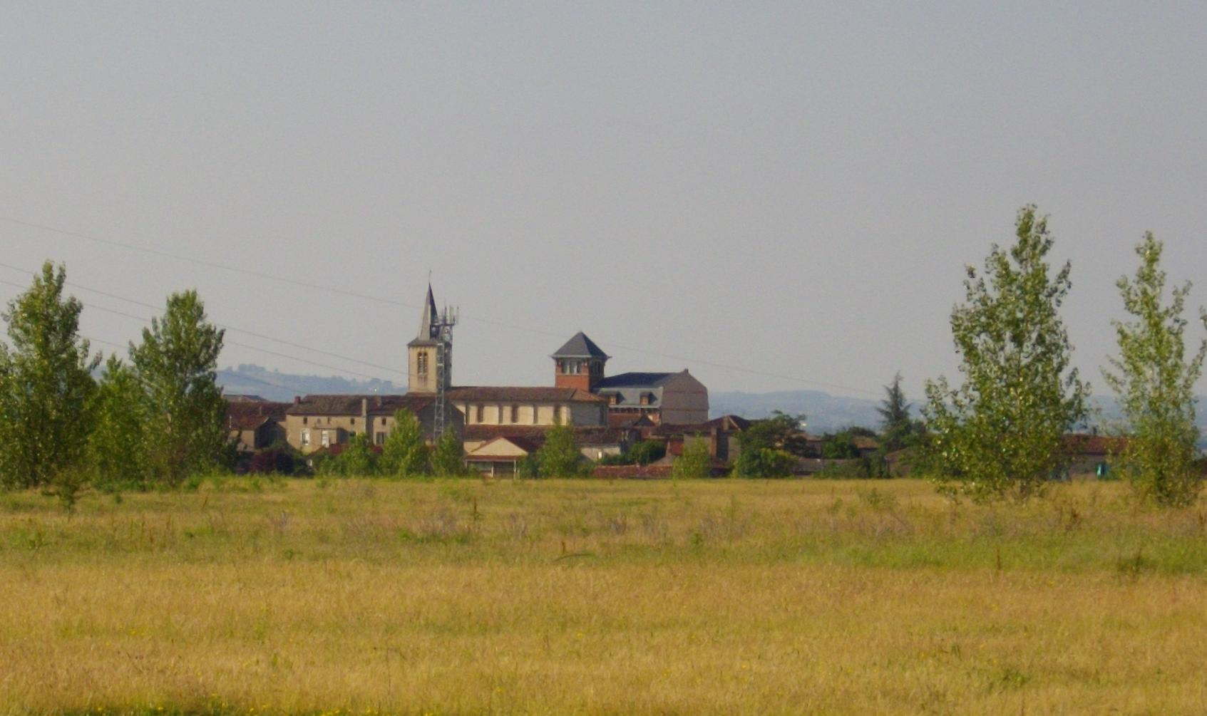 Vue sur la ville haute de Blaye-les-Mines.